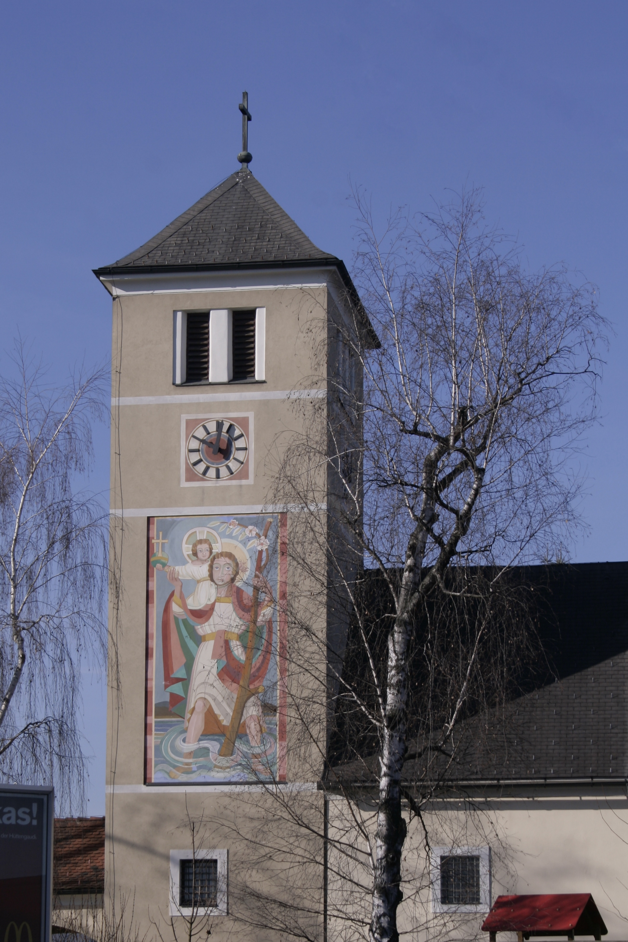 Kirche Don Bosco Graz Kirchturm von Osten